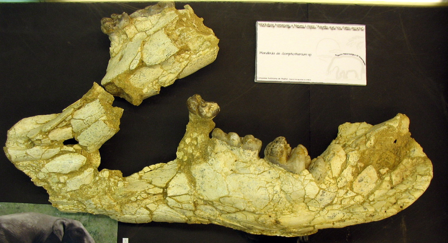 Mandíbula de Gomphotherium sp. del Yacimiento de Somosaguas (Madrid). Aragoniense Medio (Mioceno continental)